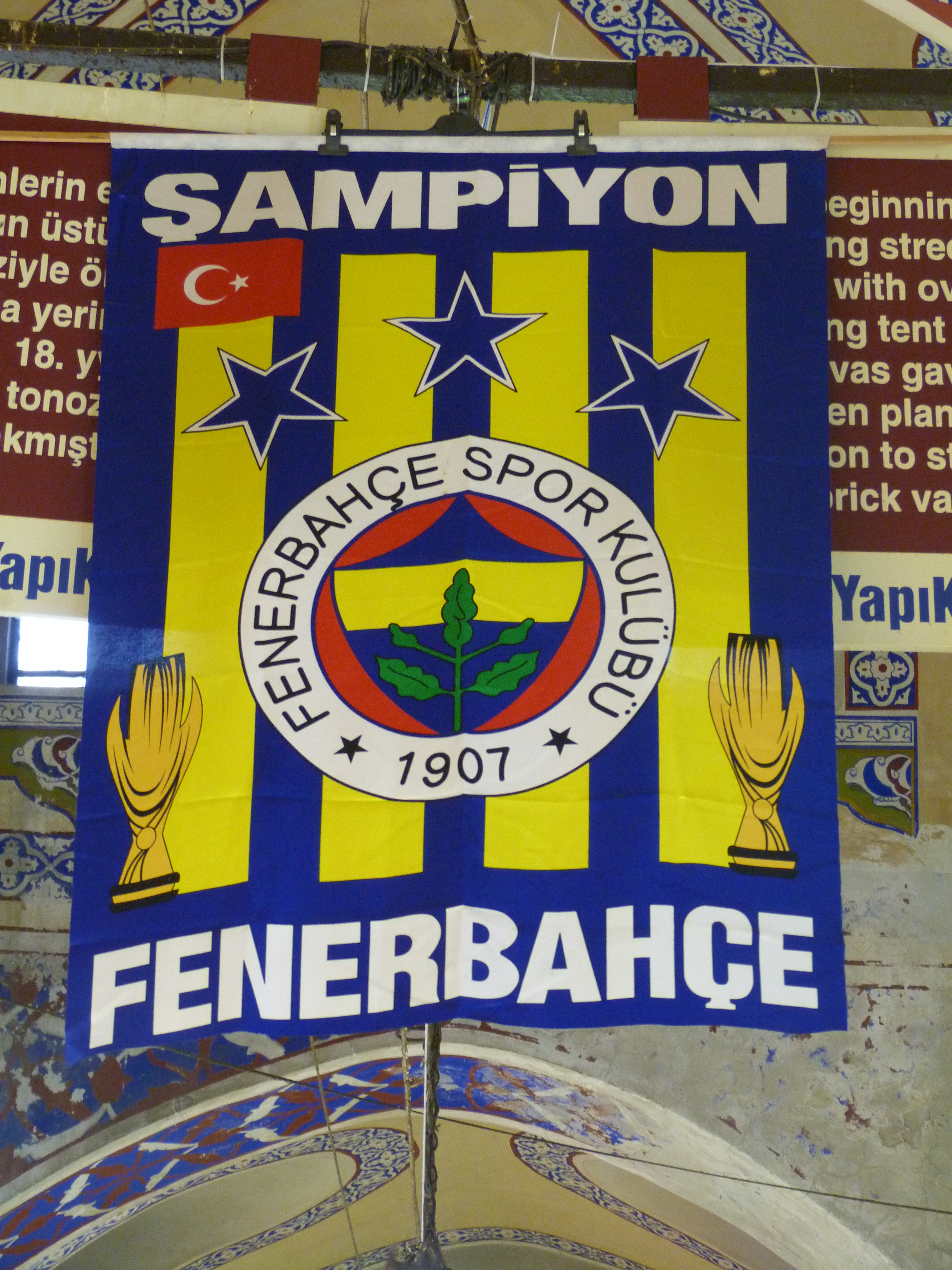 A felvétel 2014. október 23-án készült. Törökország, Isztambul. Nagy Bazár. ©© Derzsi Elekes Andor, Budapest, 2014, A kép és filmfelvételek egészben, vagy részletekben másolását, bármilyen úton történő sokszorosítását és felhasználását a szerző ellenérték nélkül, jogutódjaira is kihatóan megengedi. Az engedély kiterjed a kereskedelmi célú hasznosításra is. Kéri azonban nevének feltüntetését a felhasználás során. A Metapolisz sorozat valamennyi képe és filmje Creative Commons alatti valamint kereskedelmi - for profit - célra is felhasználható. Ajánlott hivatkozás: Derzsi Elekes Andor: Metapolisz DVD line